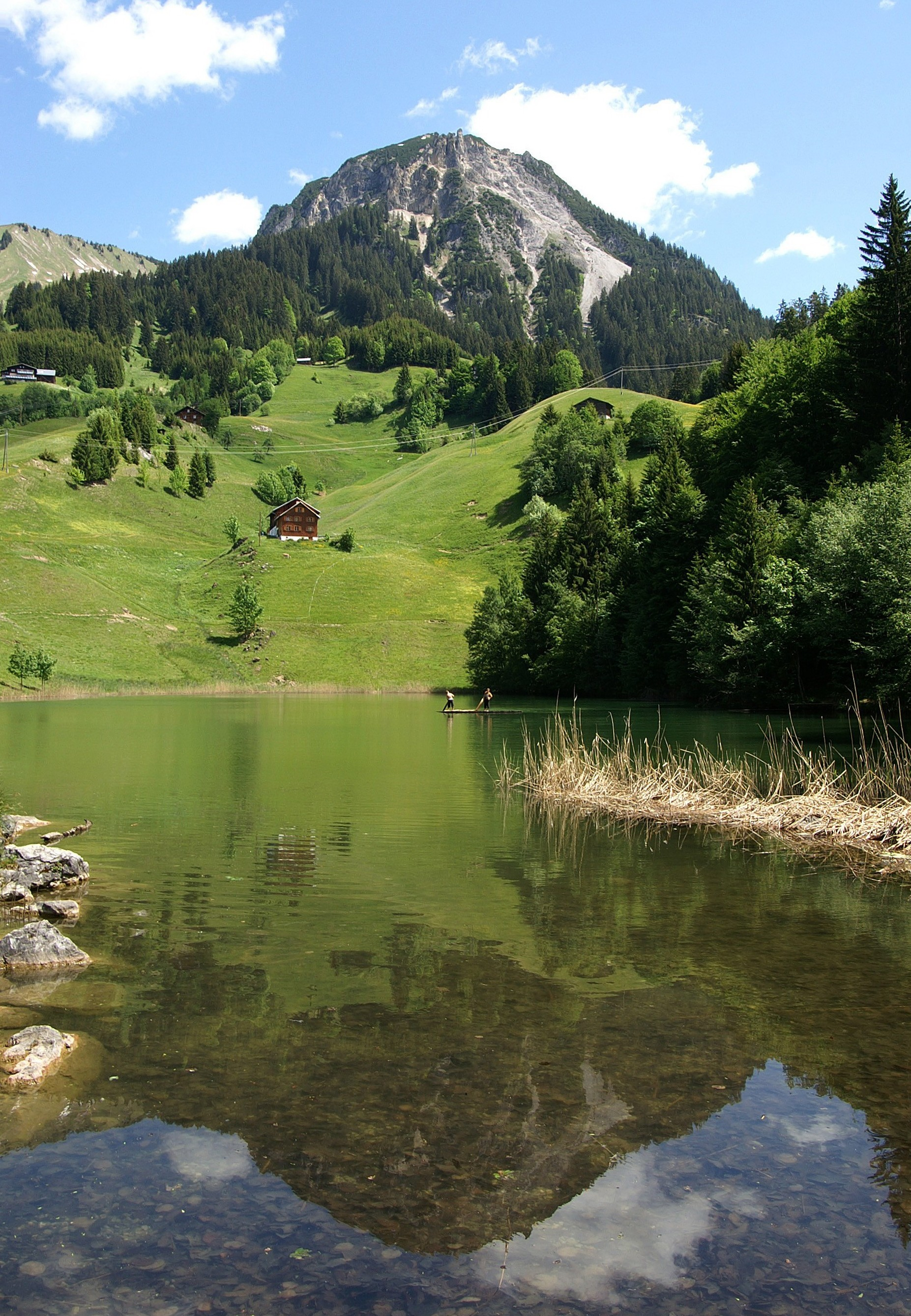 Blick vom Seewaldsee auf die Blasenka 2004m. Der See liegt in einem Talkessel im Gemeindegebiet von Fontanella im Große Walsertal, Vorarlberg.